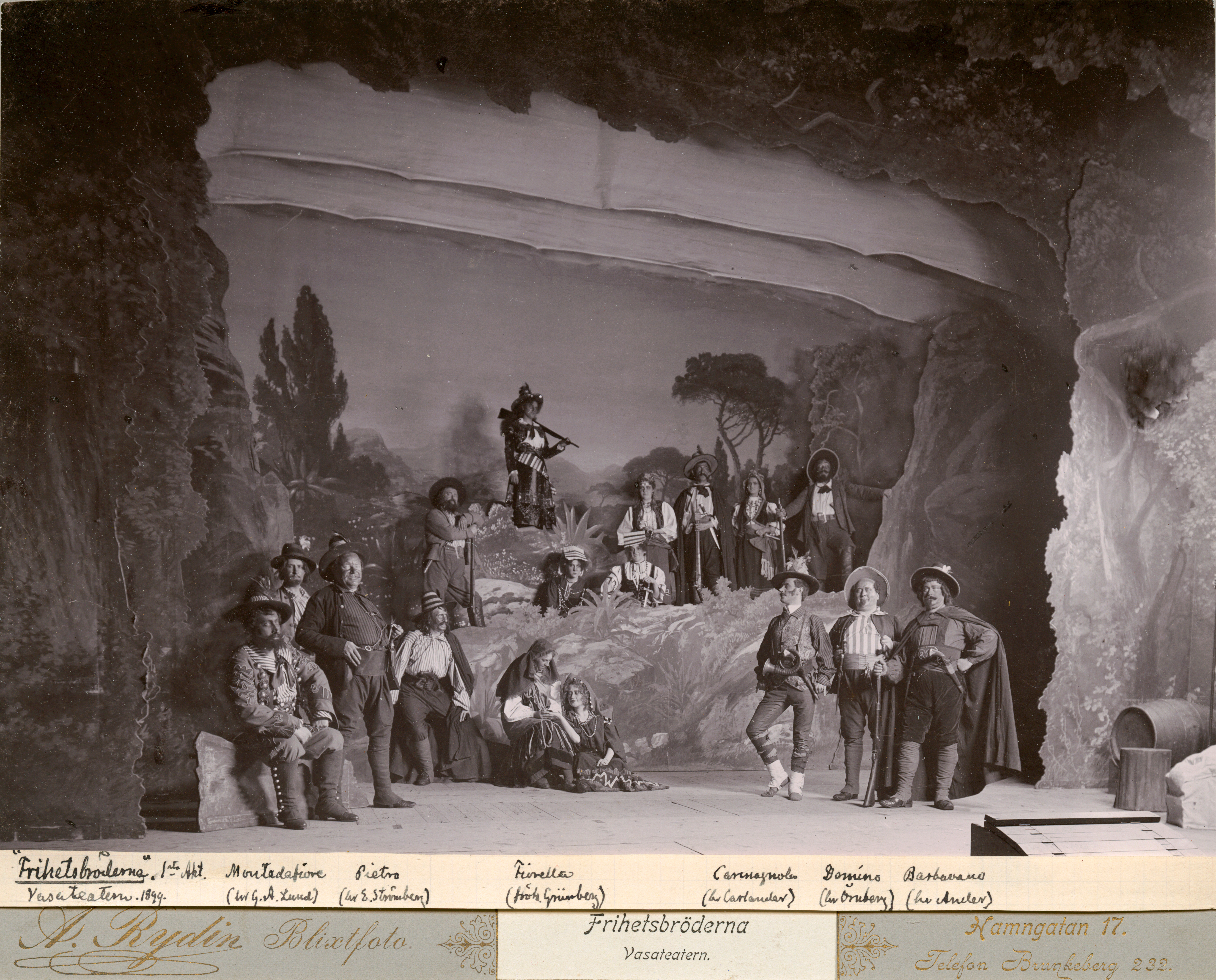 Frihetsbröderna = Les Brigands. Akt 1. Vasateatern, Stockholm, 1899. Gustaf Adolf Lund som Montedafiore, Emil Strömberg som Pietro, Rosa Grünberg som Fiorella, Carl Carlander som Carmagnola, Frans Örnberg som Domino & David Ander som Barbavano (m.fl)